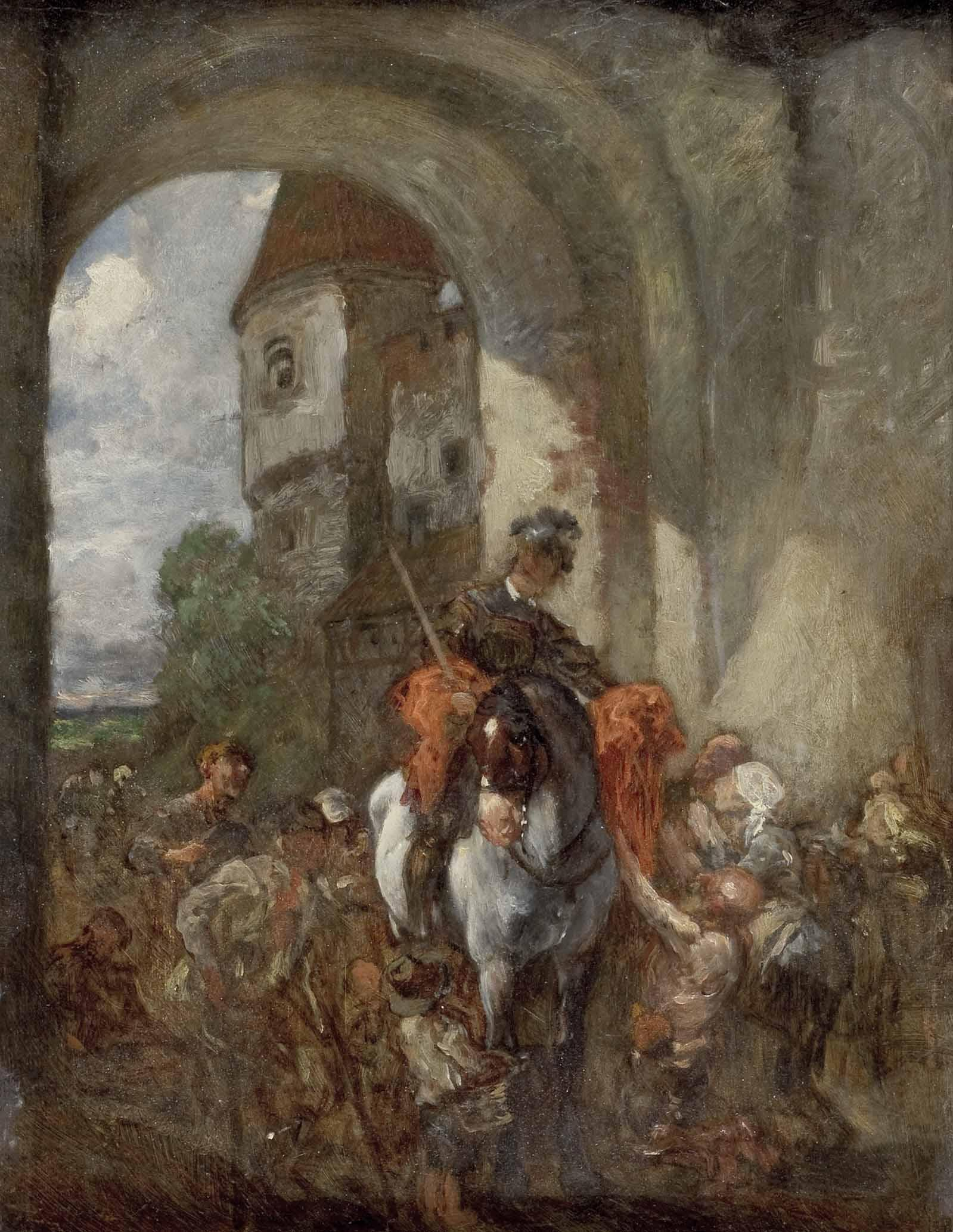 "Heiliger Martin am Stadttor" Rückseite: Nachlassstempel und schriftliche Bestätigung (vom Sohn d. Künstlers?), Öl auf Holz, ca. 31 x 23 cm